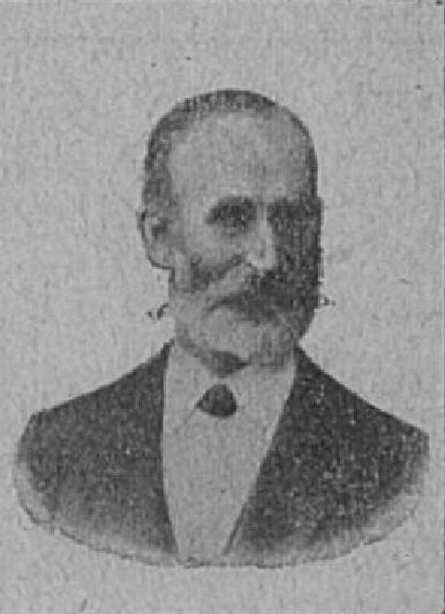 Jan Wýtwar (1833-1926), rakouský podnikatel a politik české národnosti